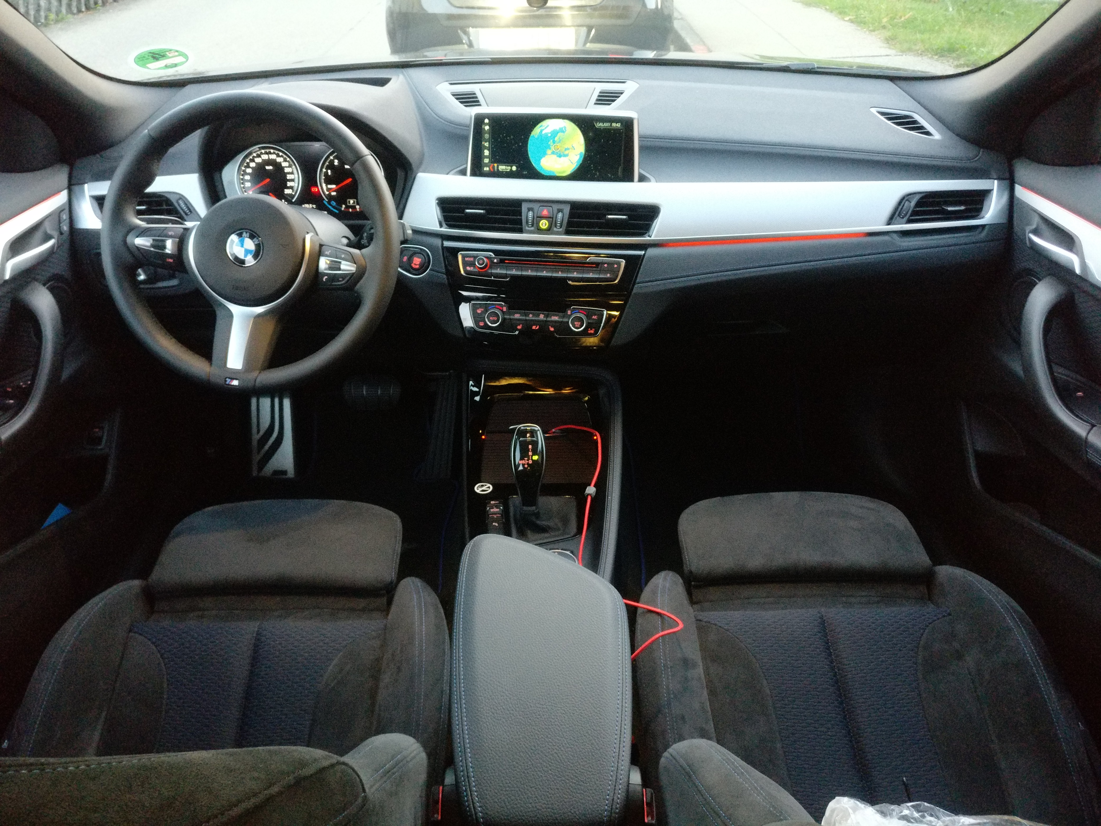 Interieur eines BMW X2, Baujahr 2018